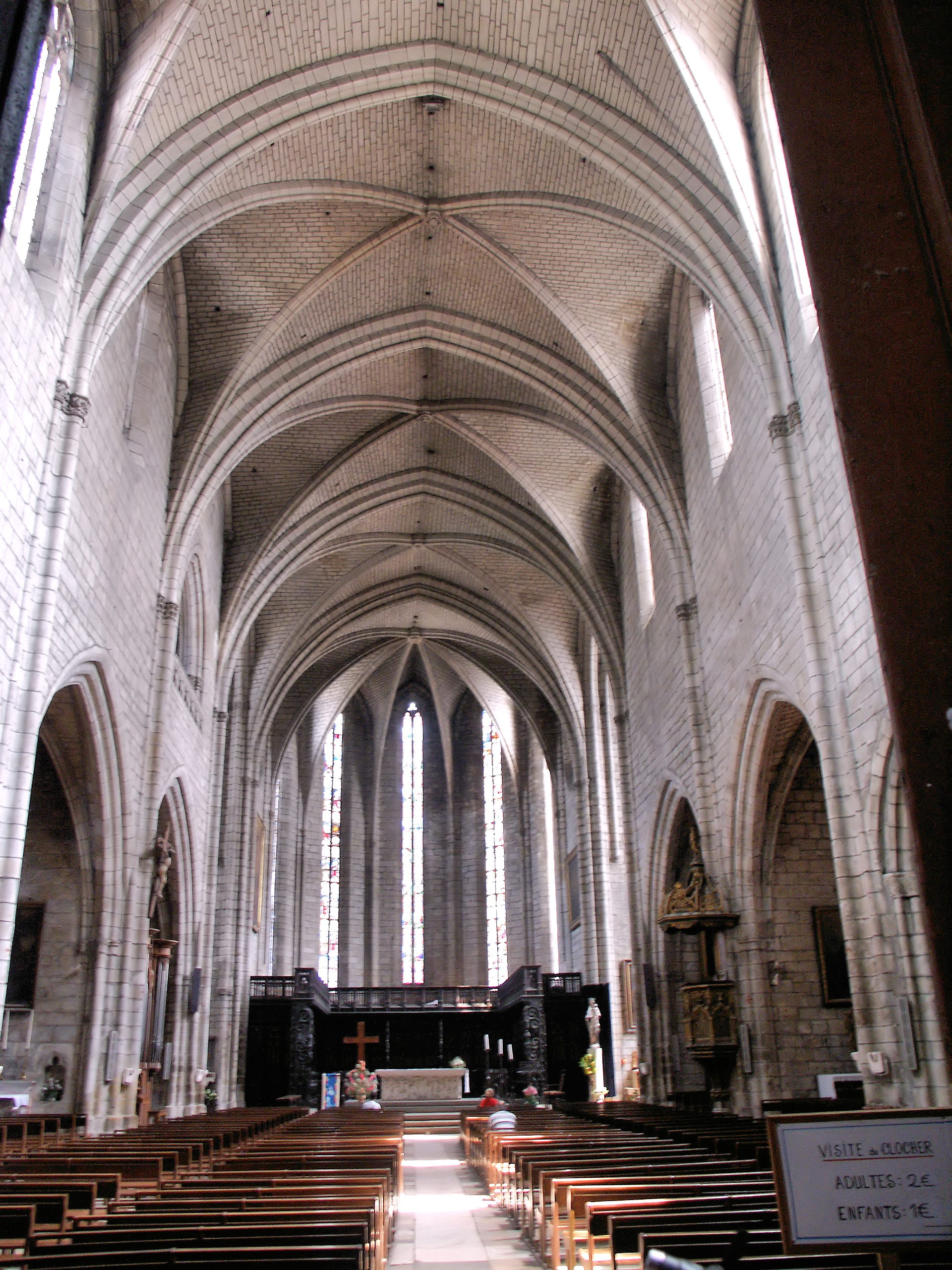 Vue intérieure (grande nef) de l'église Notre-Dame de Villefranche de Rouergue